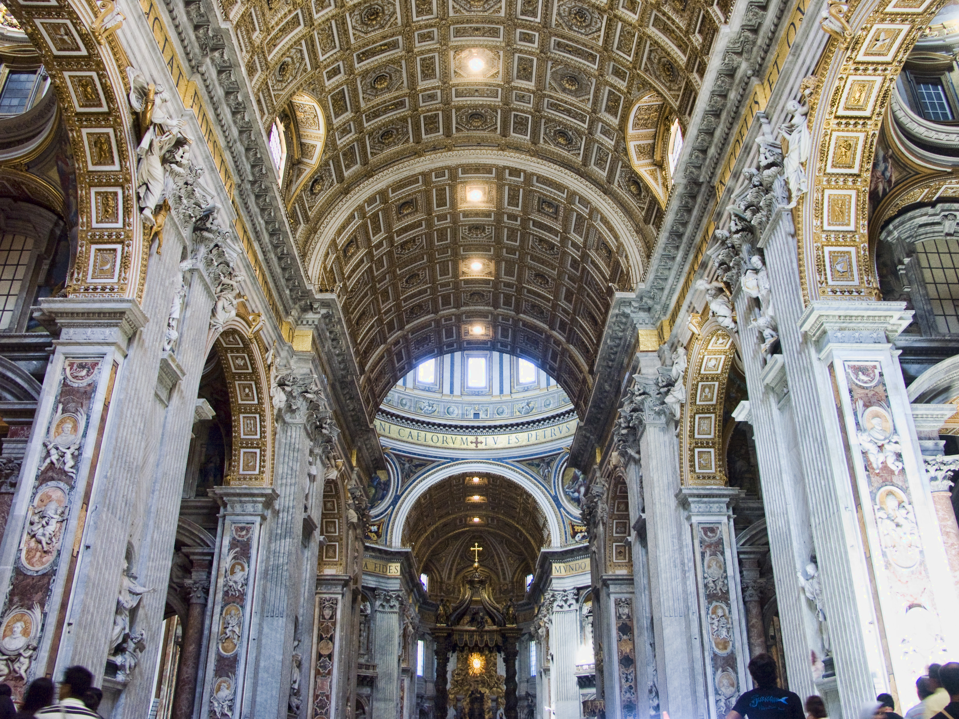 Vatican, Basilique St Pierre, Intérieur